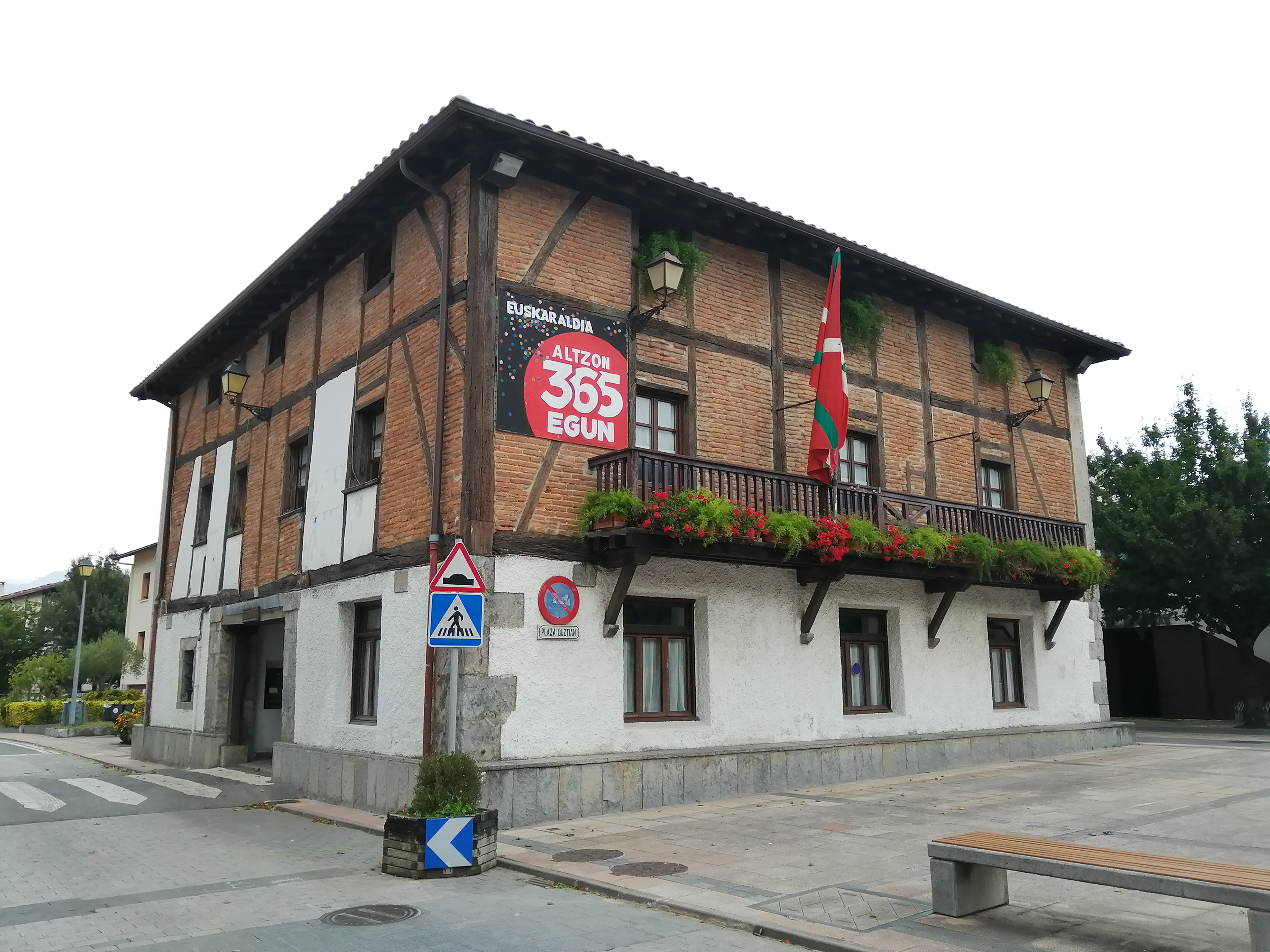 Altzoko udaletxea